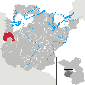 Ziesar in Brandenburg (Country) - District Potsdam-Mittelmark